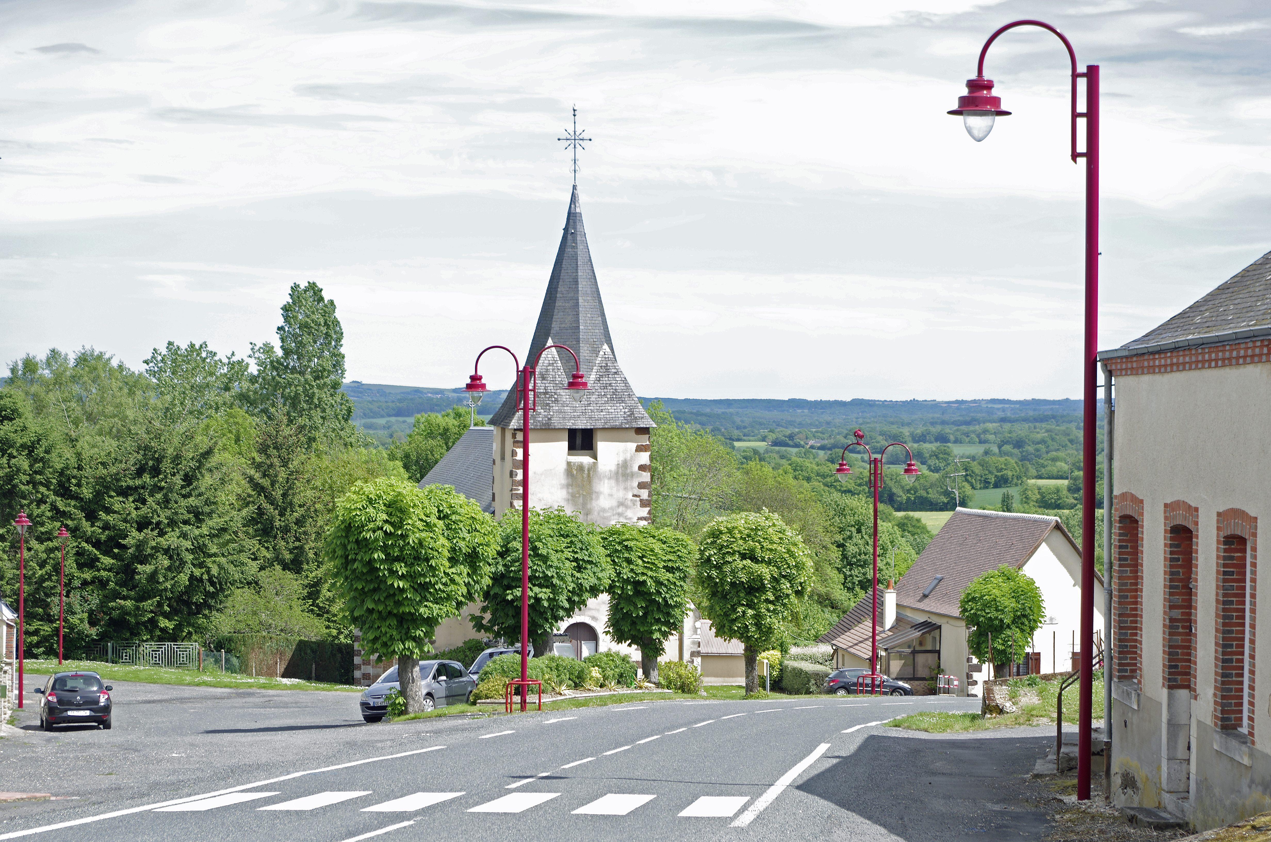 Dampierre-en-Crot (Cher). Eglise Saint-Pierre. L'église date du XIVème siècle. Les angles de la tour carrée du clocher sont en grés noir de Vailly. L'entourage de la porte en plein cintre est en pierre blanche de Sancerre. Le nom du village vient de "Dominus Petrus", en rapport avec Saint-Pierre. Dans le morvan, on apppelle "crot" une mare et plus généralement une fosse.